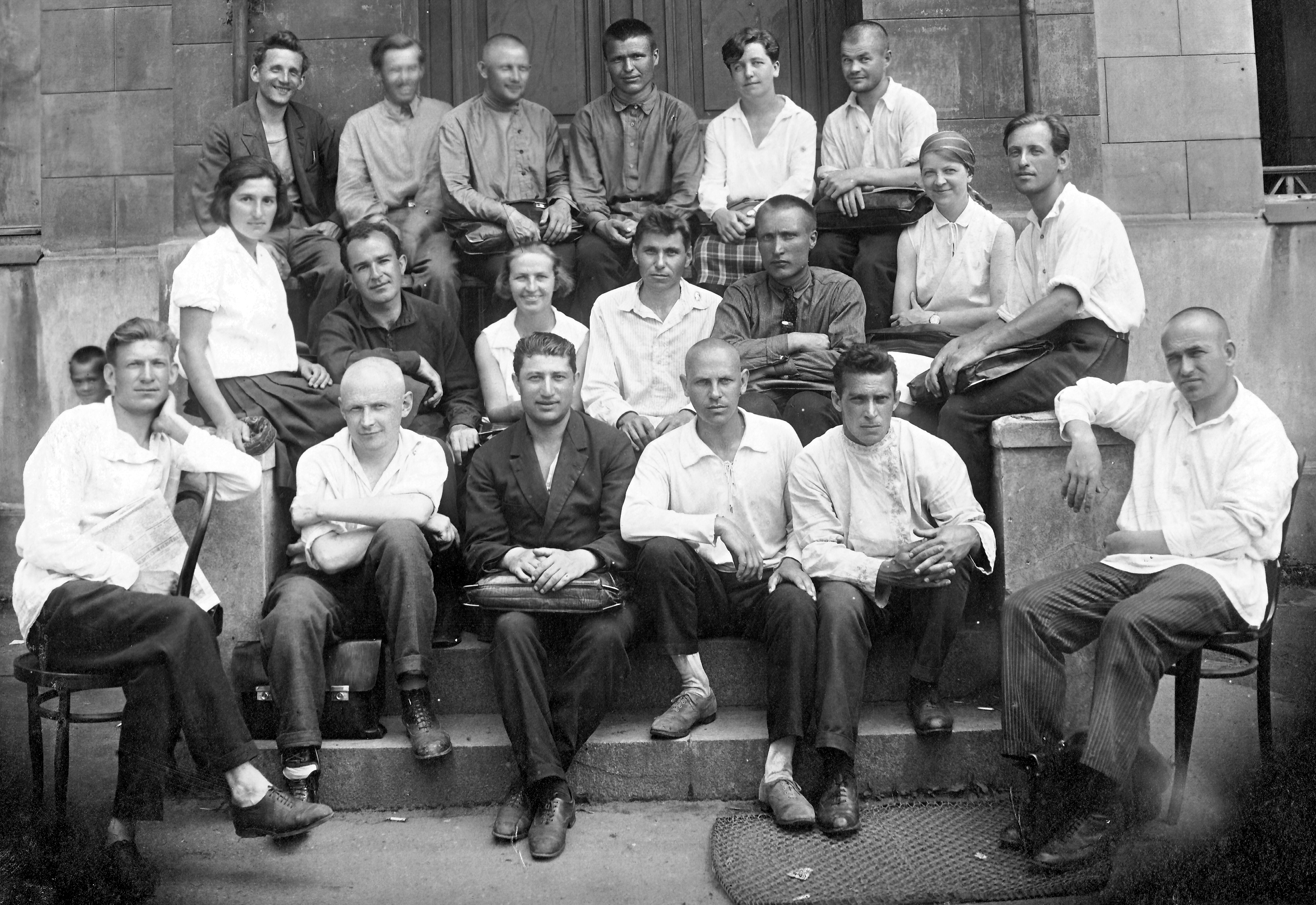 Отделение Госстроя. Окончание 2 семестра. 24 июля 1931 г. В. С. Молодцов - 1 в верхнем ряду.